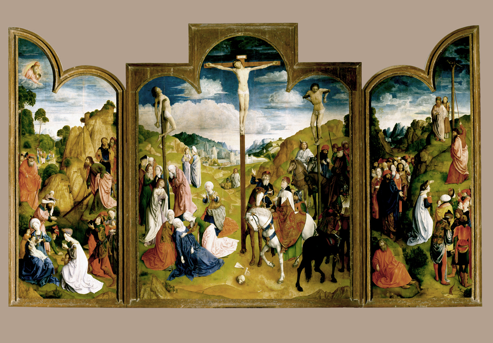 Sint-Baafskathedraal, Gent Joos van Wassenhove; alias Justius van Gent, Kalvarie; inv nr: 428